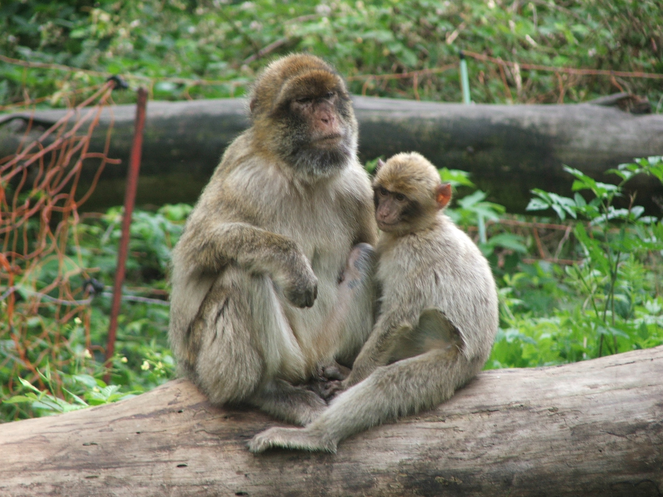 Macaca sylvanus (ZOO in Ueckermünde)